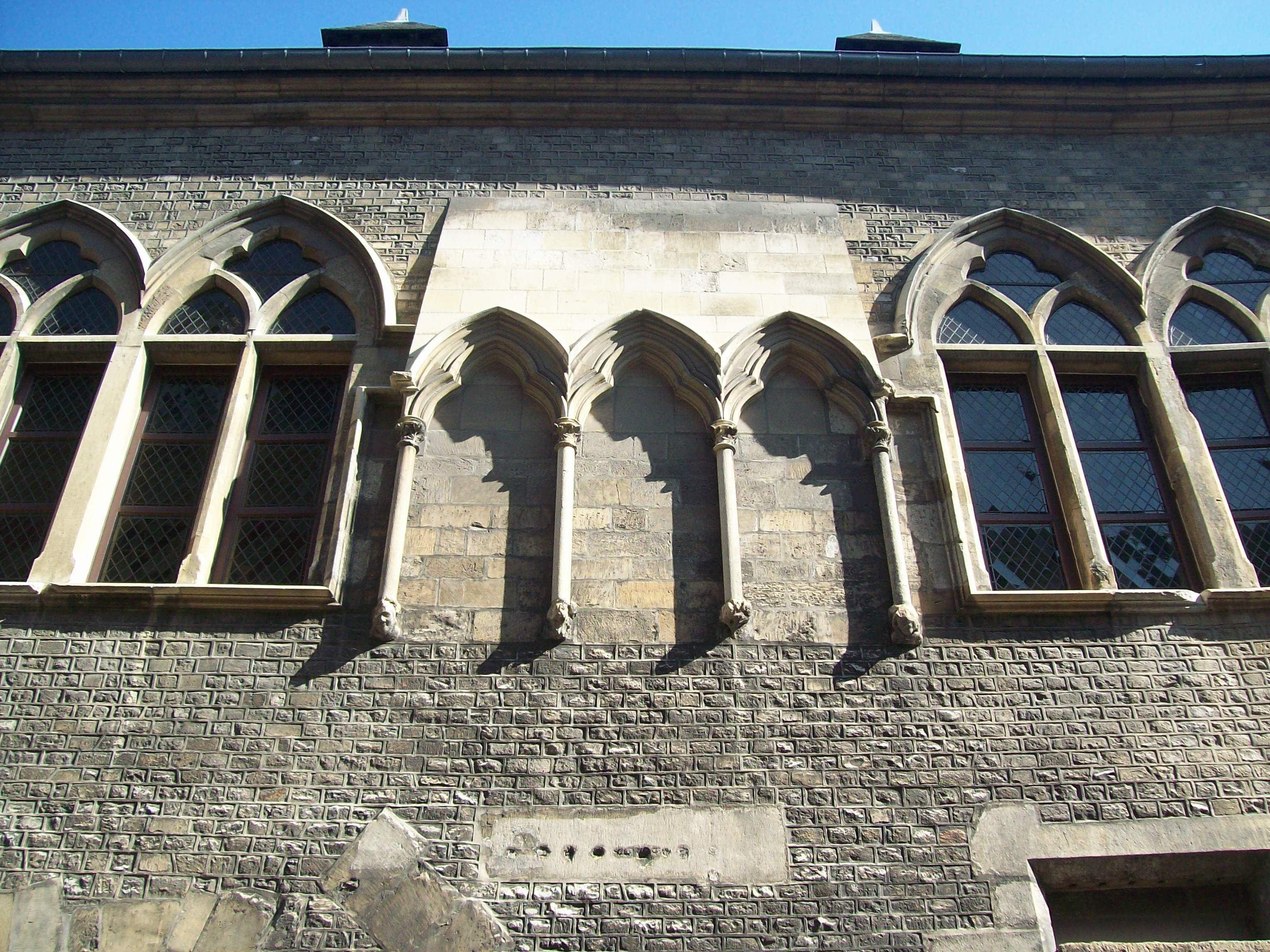 L'Hôtel des Comtes de Champagne — Reims, Champagne-Ardenne, France